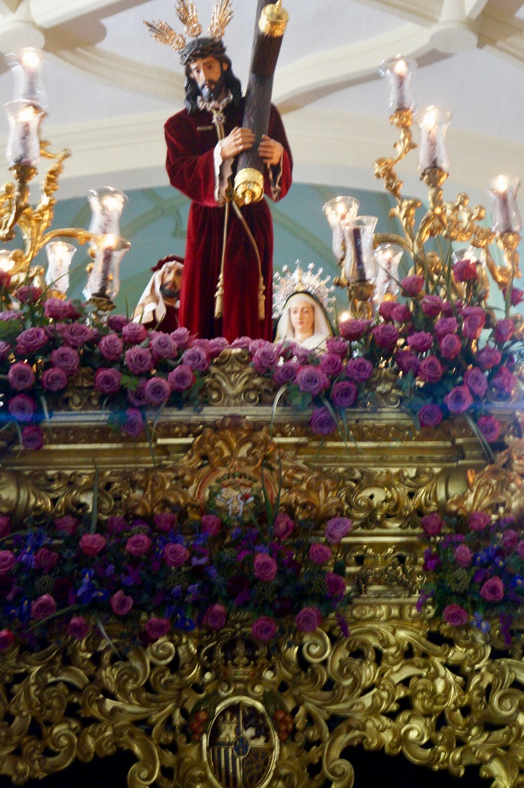 Nuestro Padre Jesús del Amparo Miércoles Santo 2019. Badajoz.